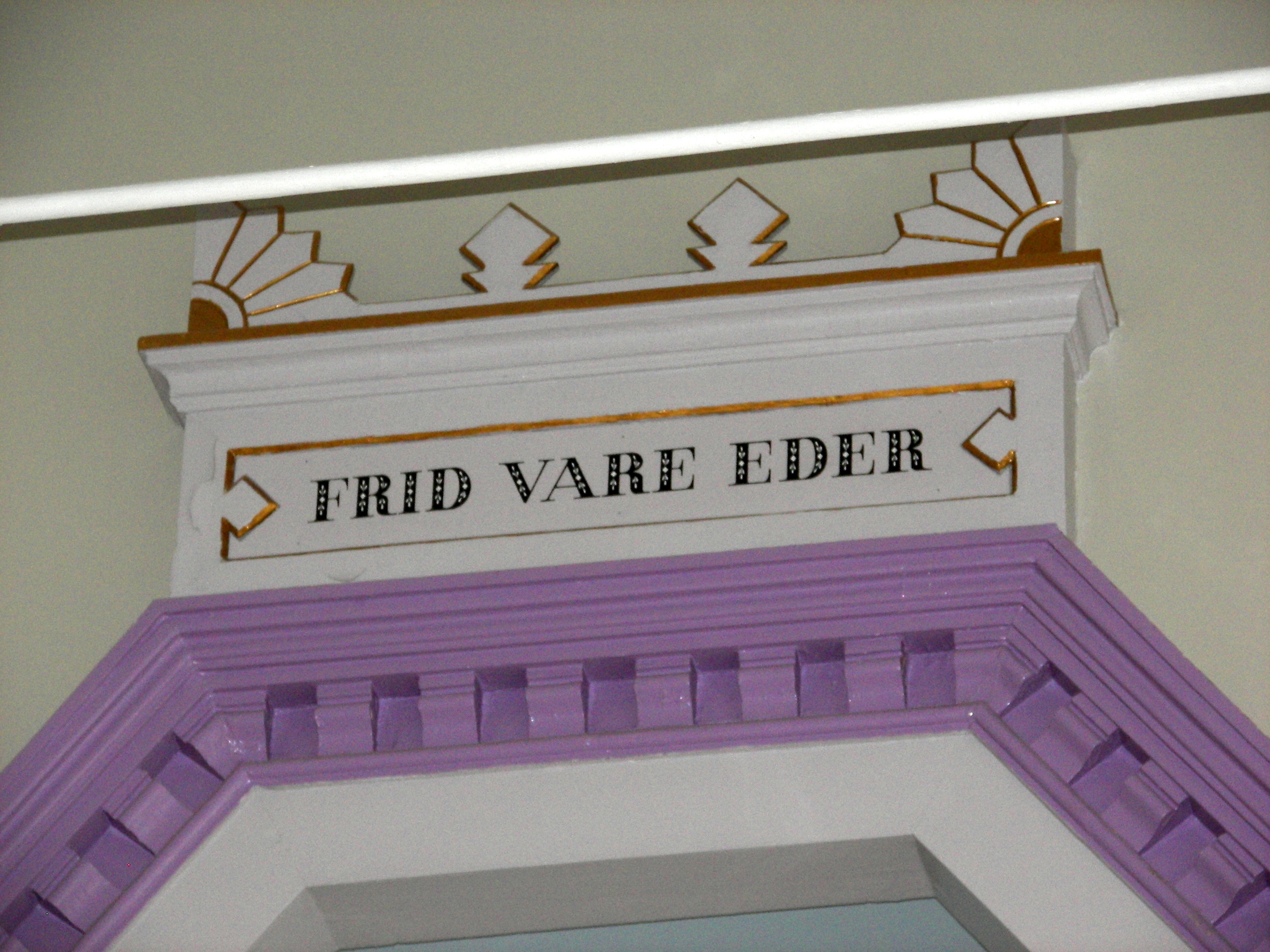 Ebeneserkyrkan i Söråker.